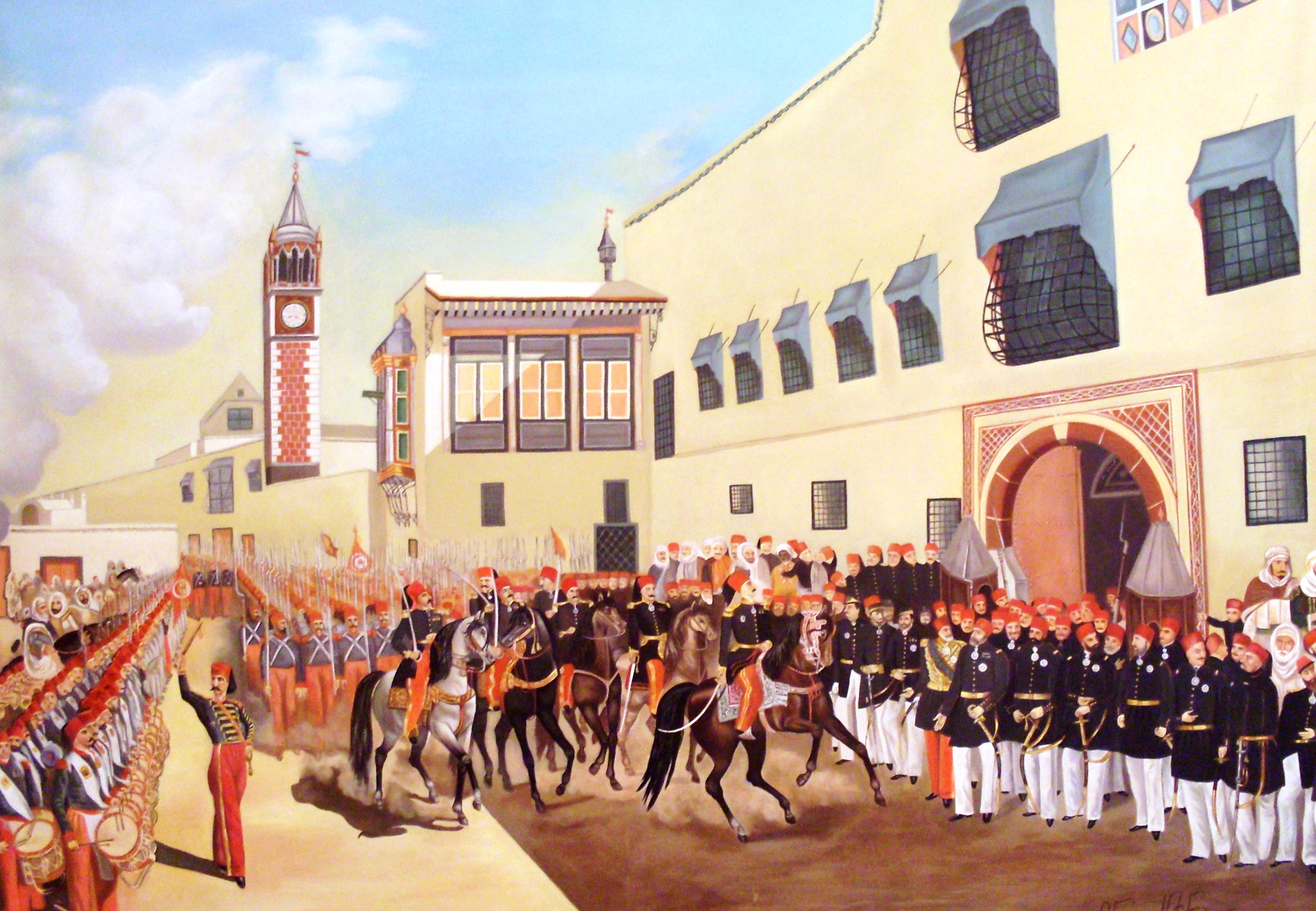 Défilé du contingent de retour de Crimée à Qsar al-Taj Tableau illustrant le retour en août 1856 du contingent tunisien de la guerre de Crimée, mené par le général Rechid et accueilli devant le Dar al-Taj par Mohammed Bey et sa suite composée notamment de Sadok Bey, Giuseppe Raffo et Mustapha Khaznadar Huile sur toile, 195 x 129,5 cm Tunis, Institut national du patrimoine, collection Qsar es-Saïd, inv. 46-07-28-04